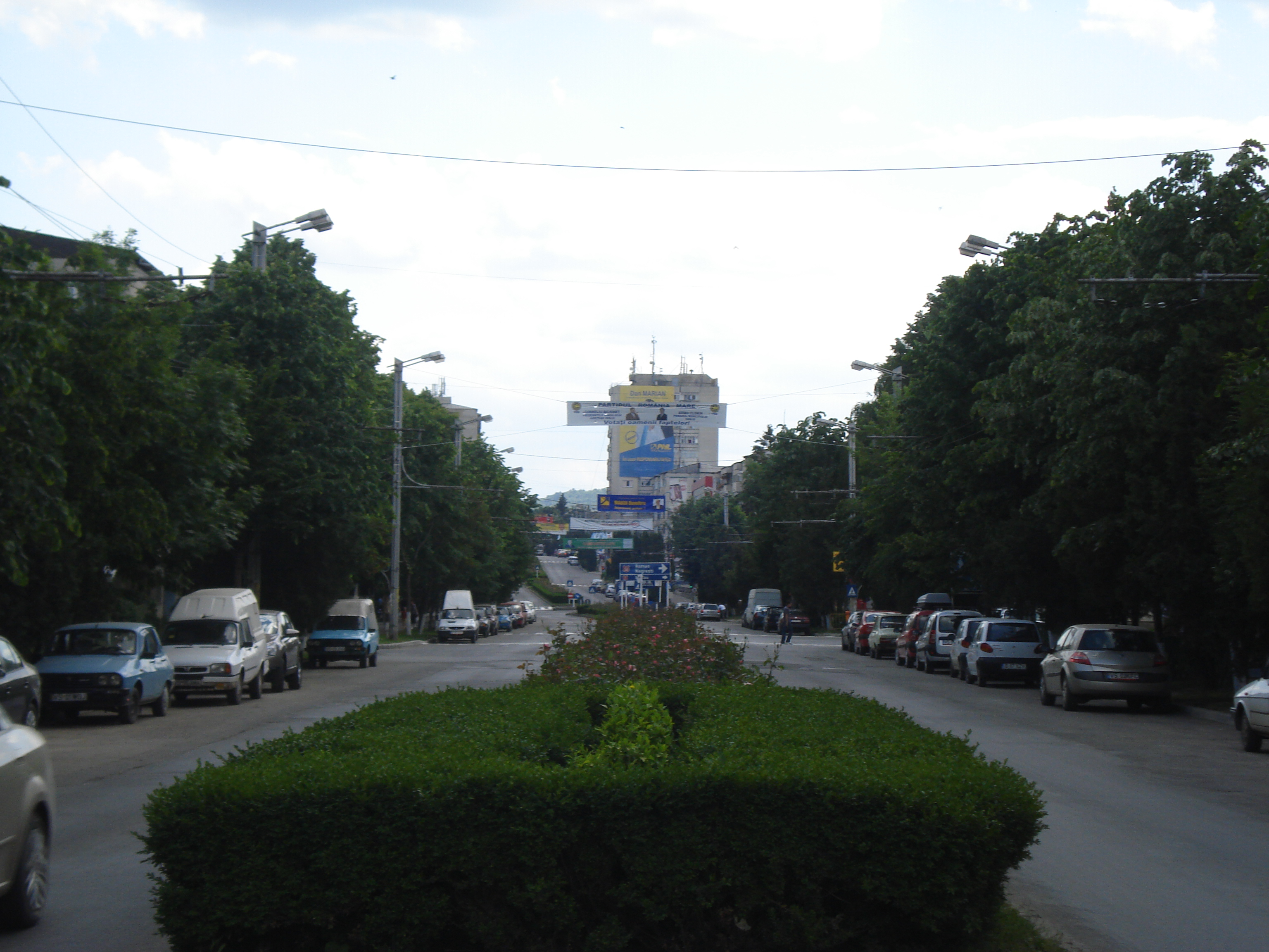 Strada Ştefan cel Mare din Vaslui